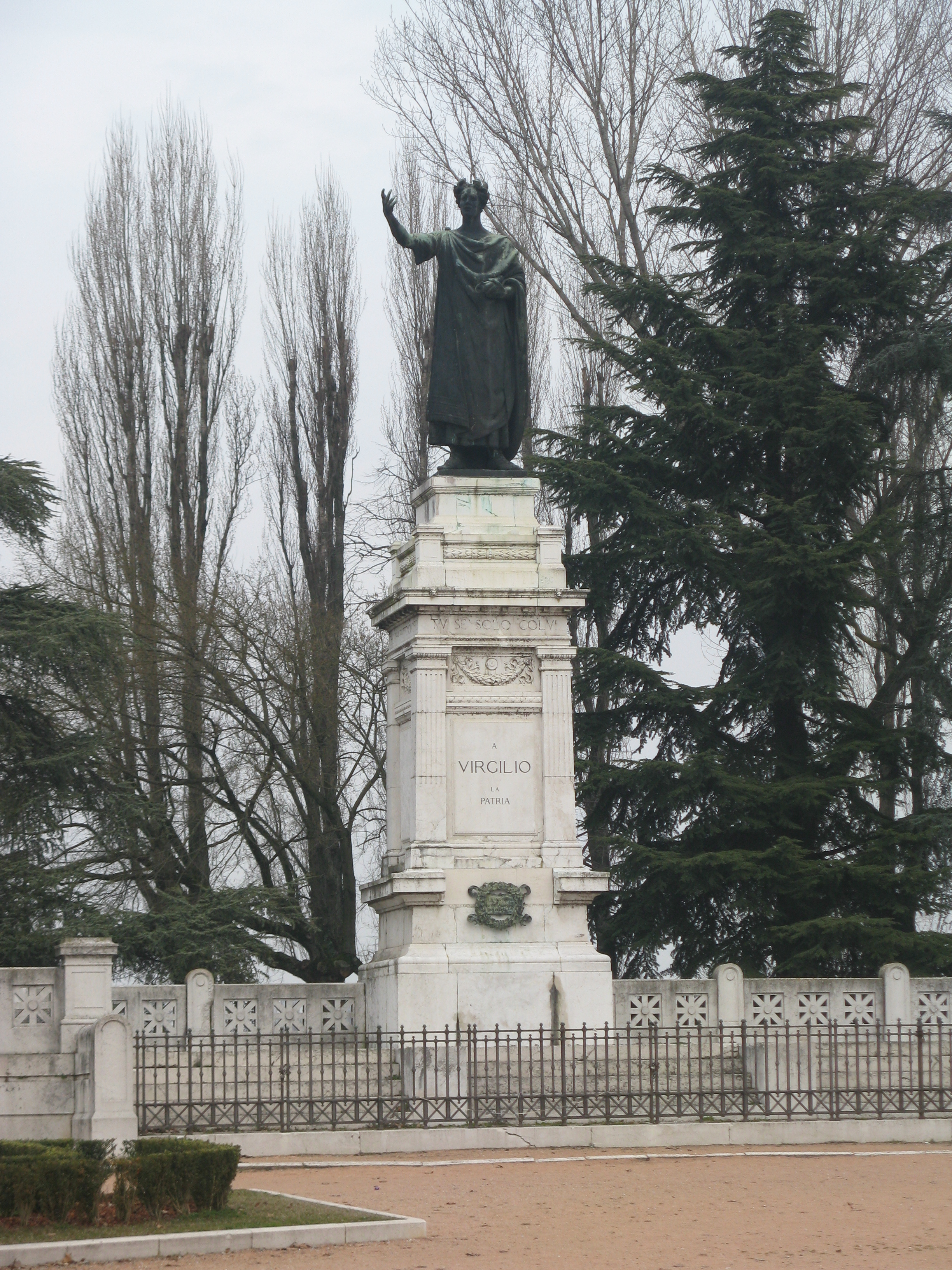 Piazza Virgiliana a Mantova, monumento a Virgilio